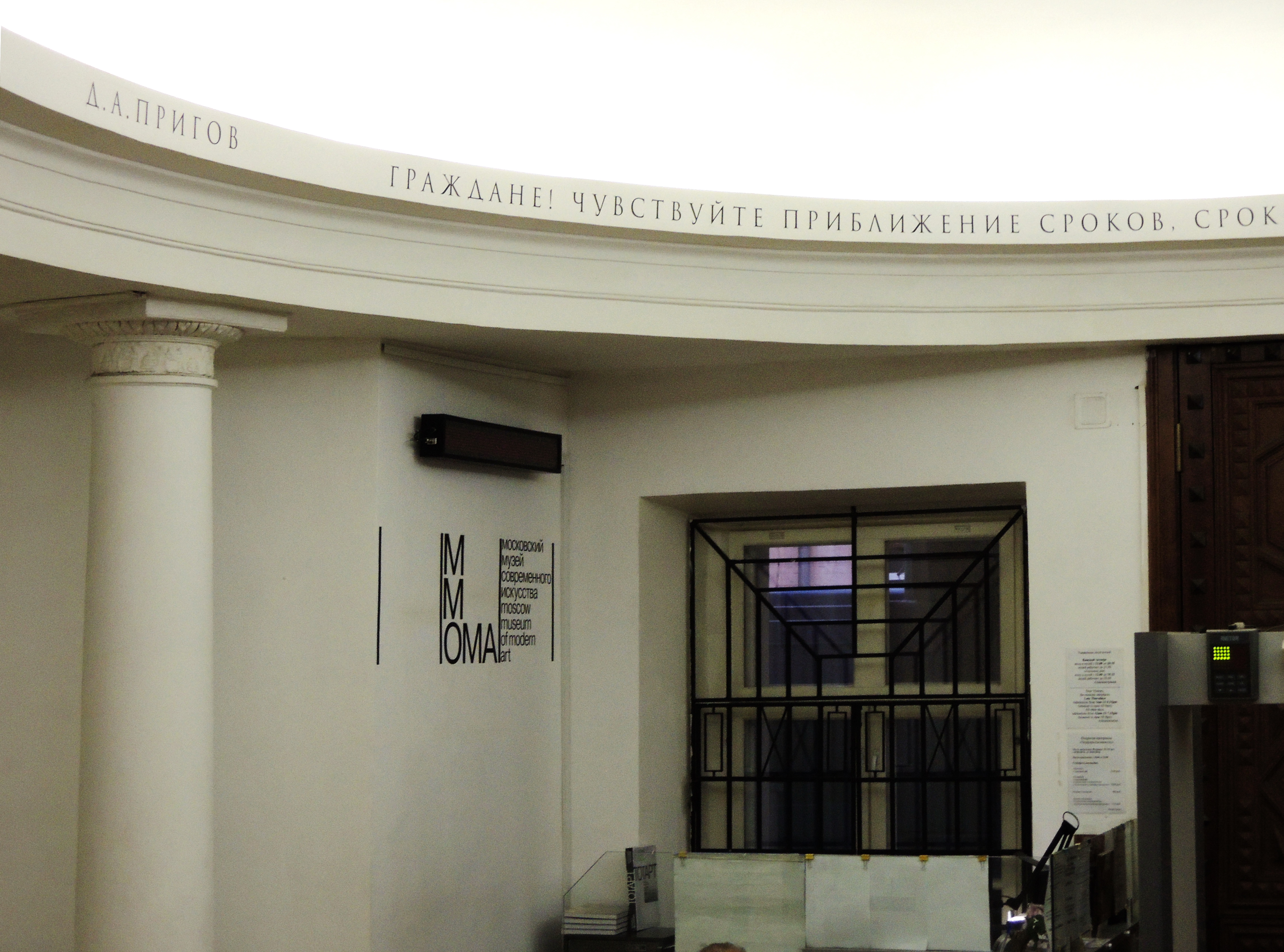 Особняк Губина — ампирный особняк в Москве, ныне — одно из зданий Московского музея современного искусства (Петровка, 25).